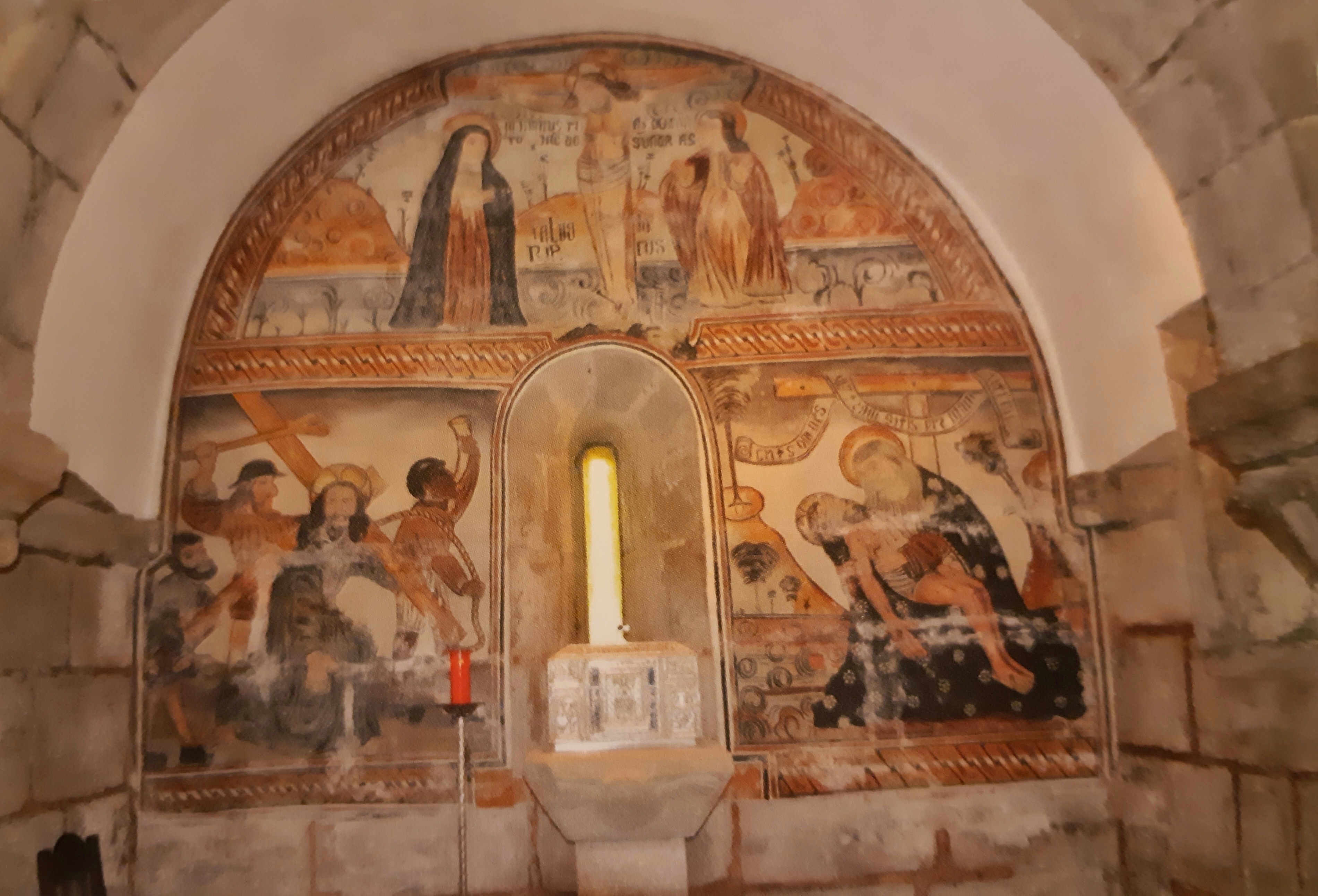 Tres escenas de pasión de Jesucristo de estilo gótico, dd comienzos del siglo XVI, concejo de Brión, Galicia.